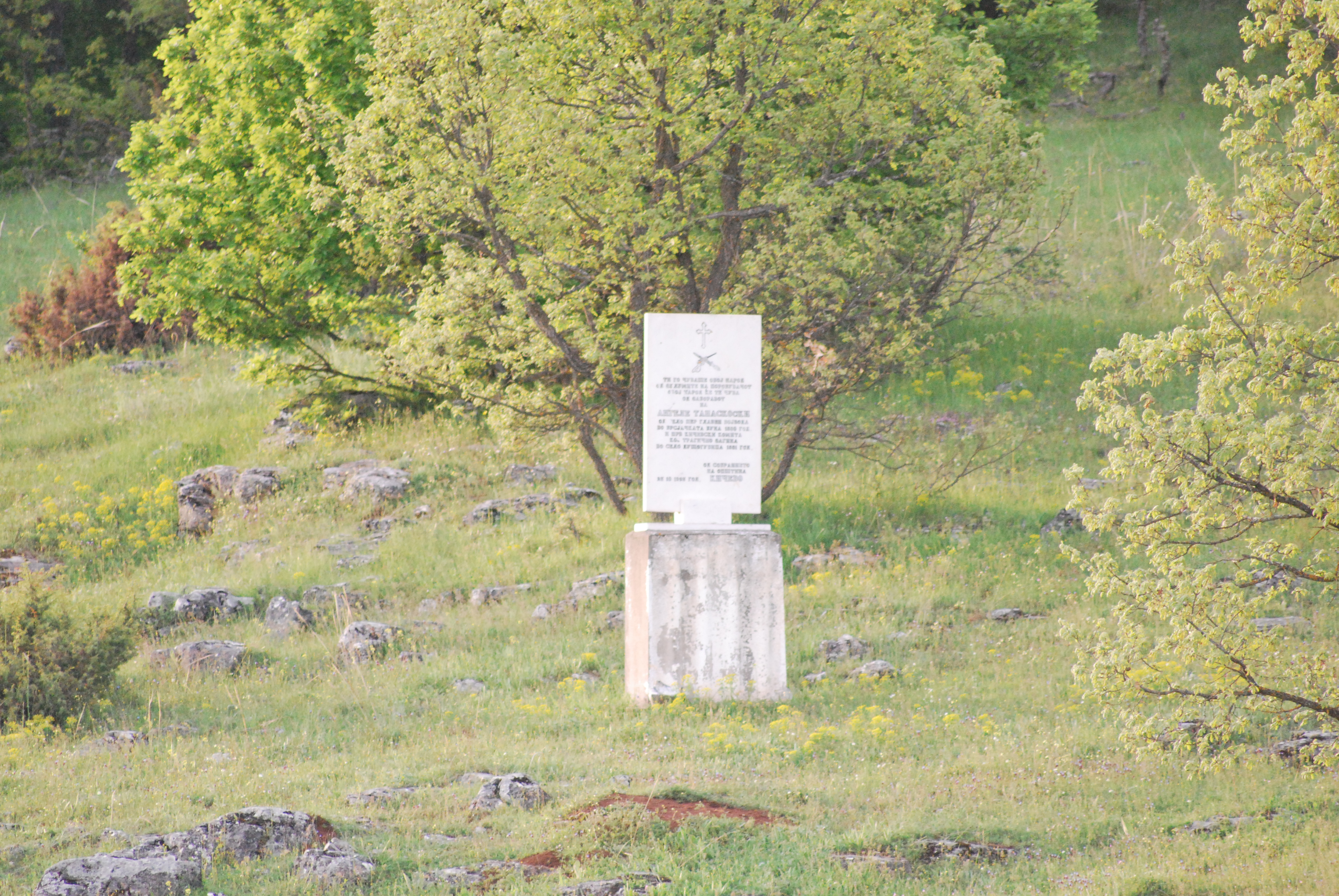 This image is uploaded as part of the picture contest Wiki Loves Cultural Heritage in Macedonia 2013. English | македонски | +/− Споменик на Ангеле Танаскоски пред Велмевци (1).JPG